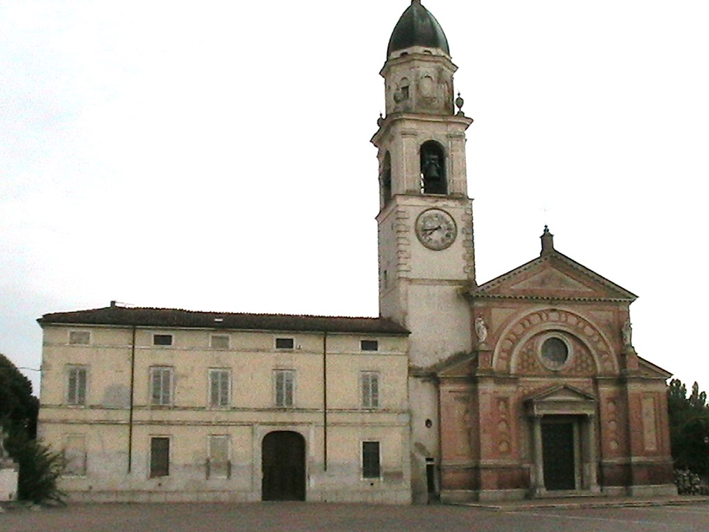 Pieveottoville (Zibello) - Chiesa parrocchiale collegiata di San Giovanni Battista